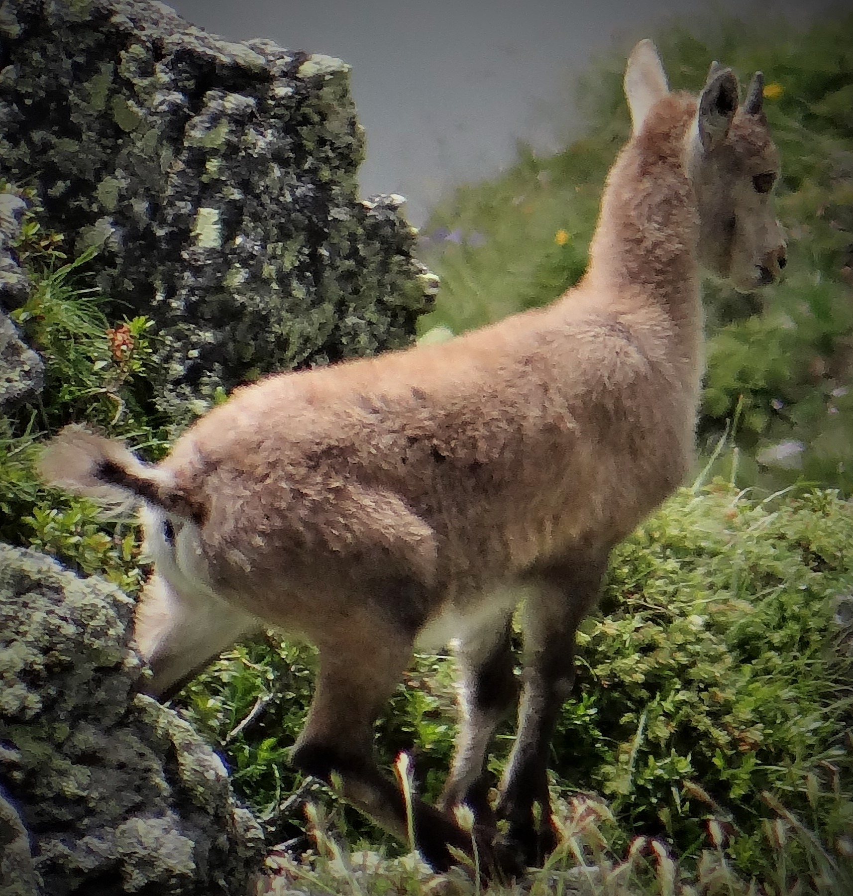 Cabri aux Rochers de la Place(2622m)